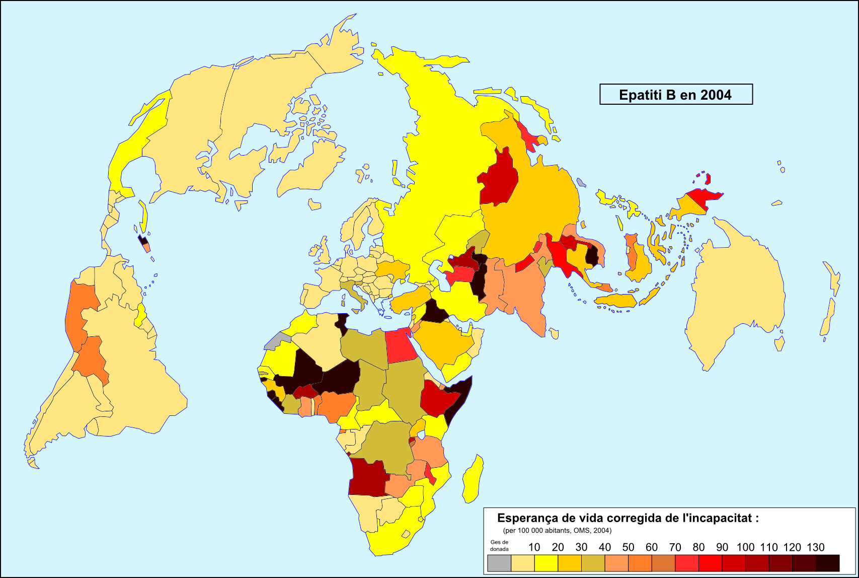 Esperança de vida corregida de l'incapacitat per l'epatiti B en 2004.